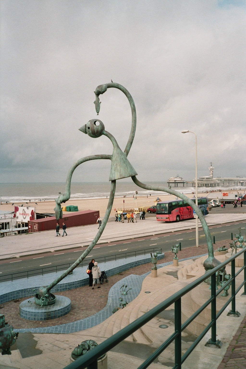 Statue moderne du mangeur de hareng (Haringeater), a Scheveningen, au milieu de petites statues évoquant des comtes et légendes.